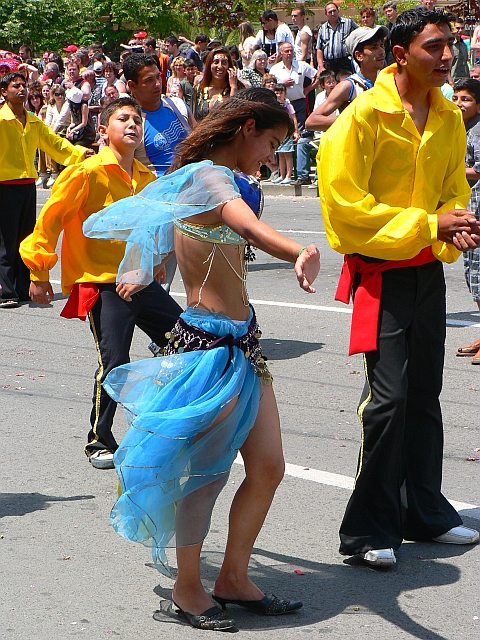 Übersetzung mit Google-Sprachtools: "Gruppe "Roma Rhythmus" - Praznik auf Rosati, Gr. Kazanlak, 2006"